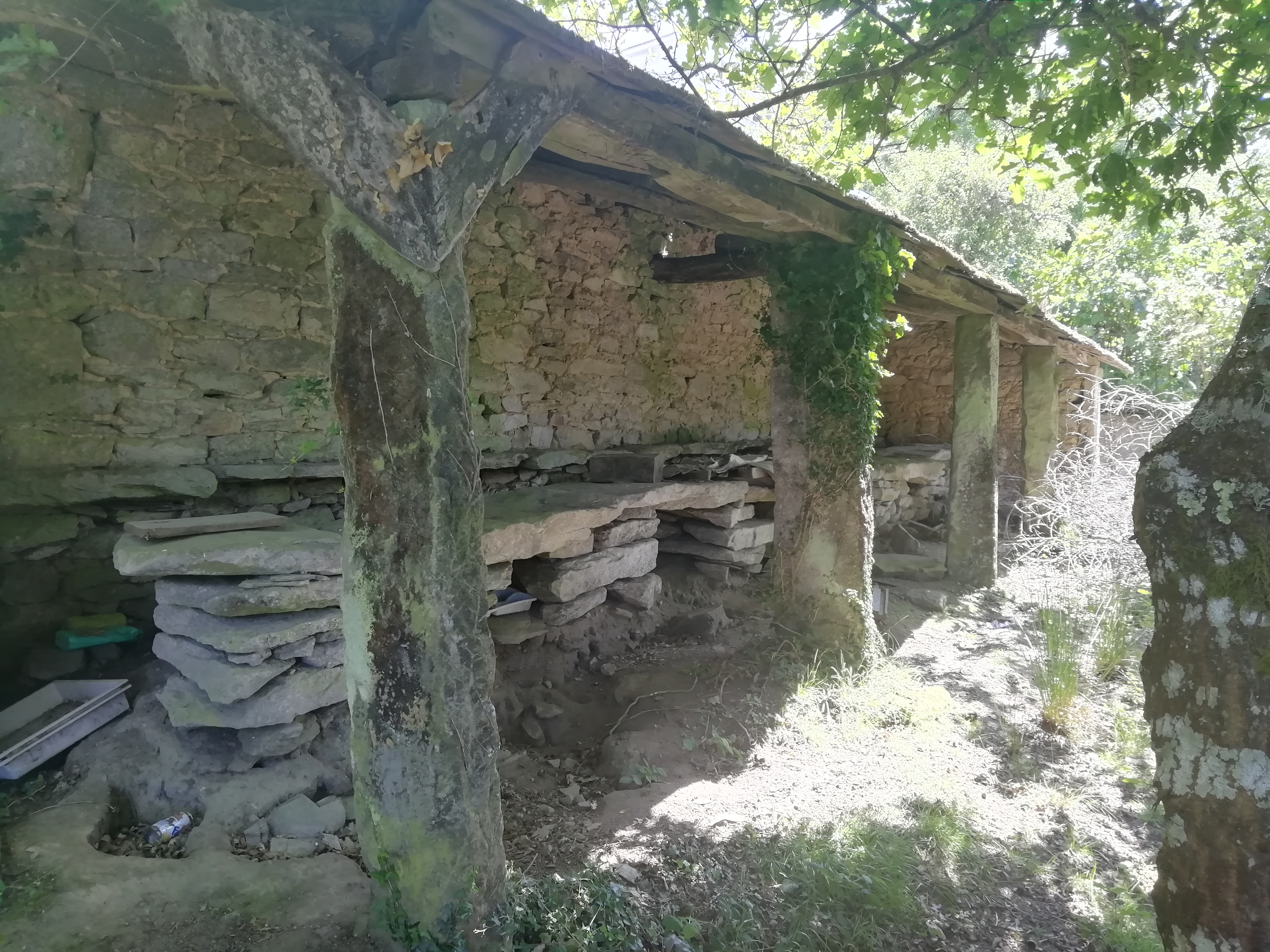 Detalle de parte dos pendellos da antiga feira de Cotá